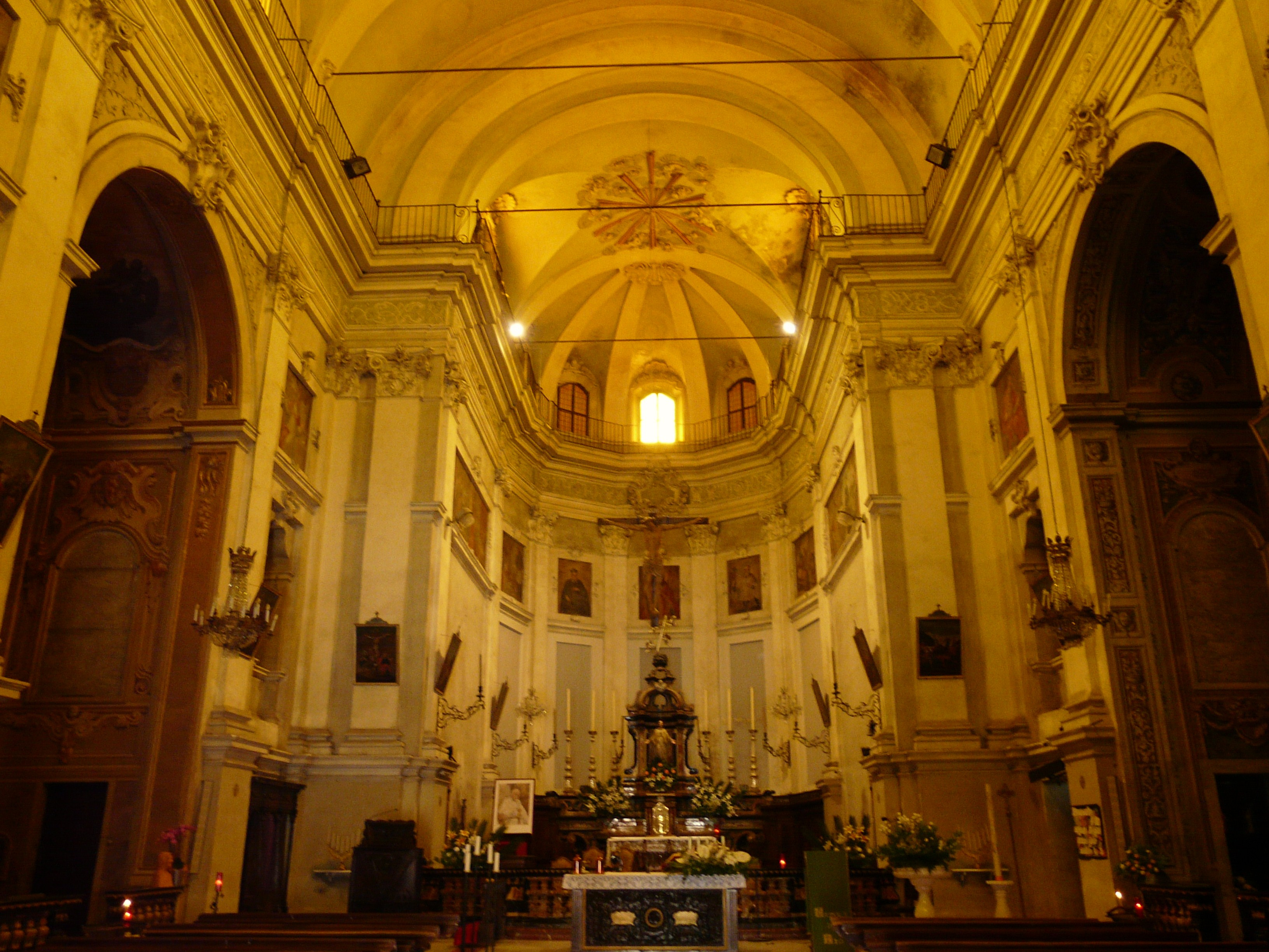 Chiesa di Santa Maria e di San Remigio, Pecetto di Valenza, Piemonte, Italia